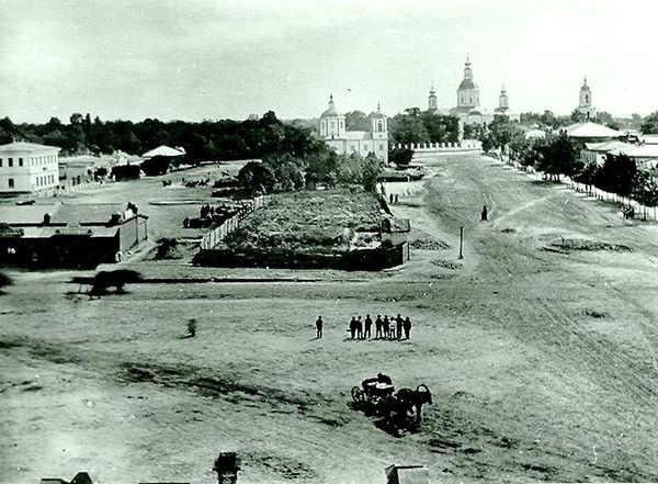 Охтирка_стара_світлина.jpg: Охтирка, стара світлина